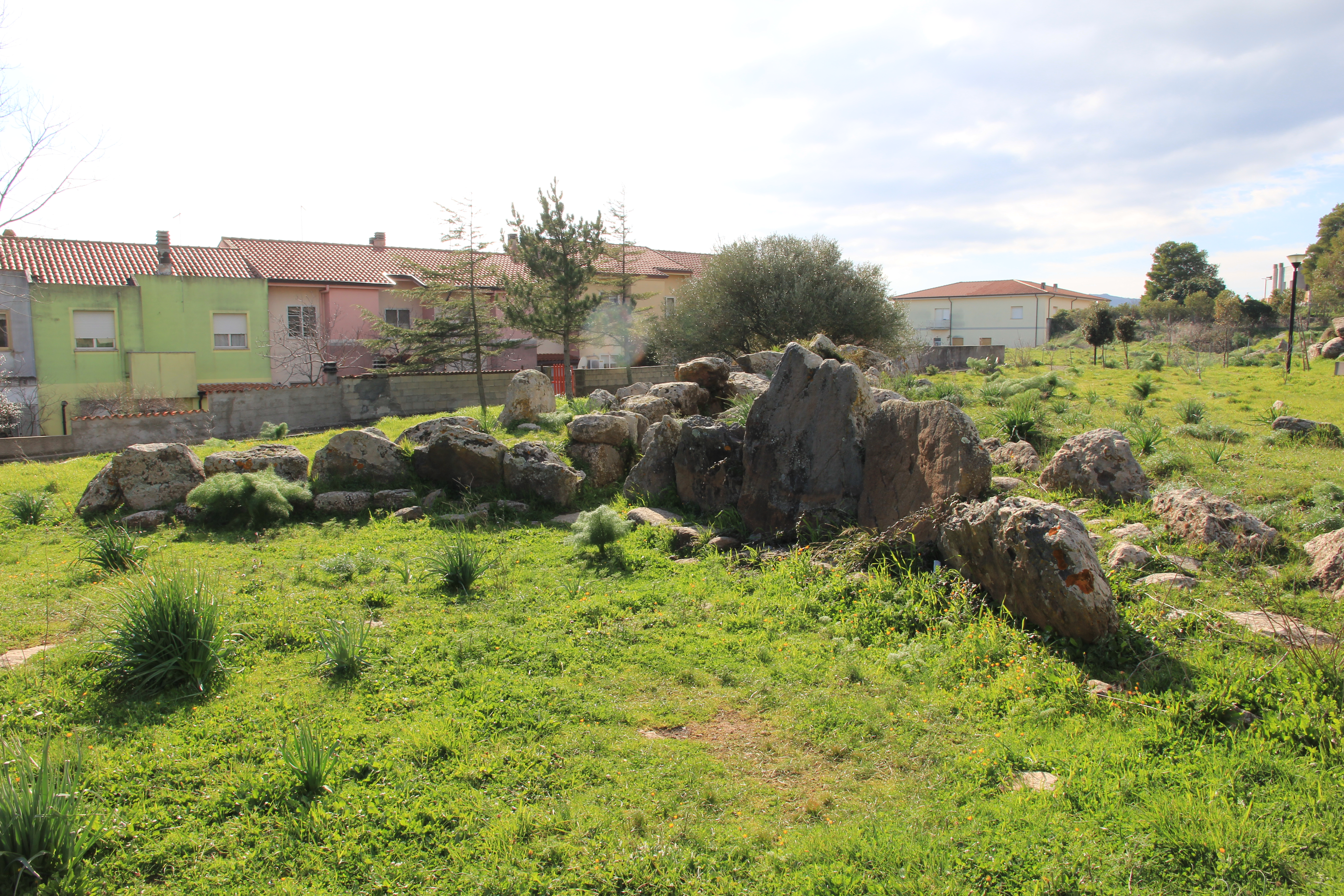 Birori - Tomba dei giganti di Palatu